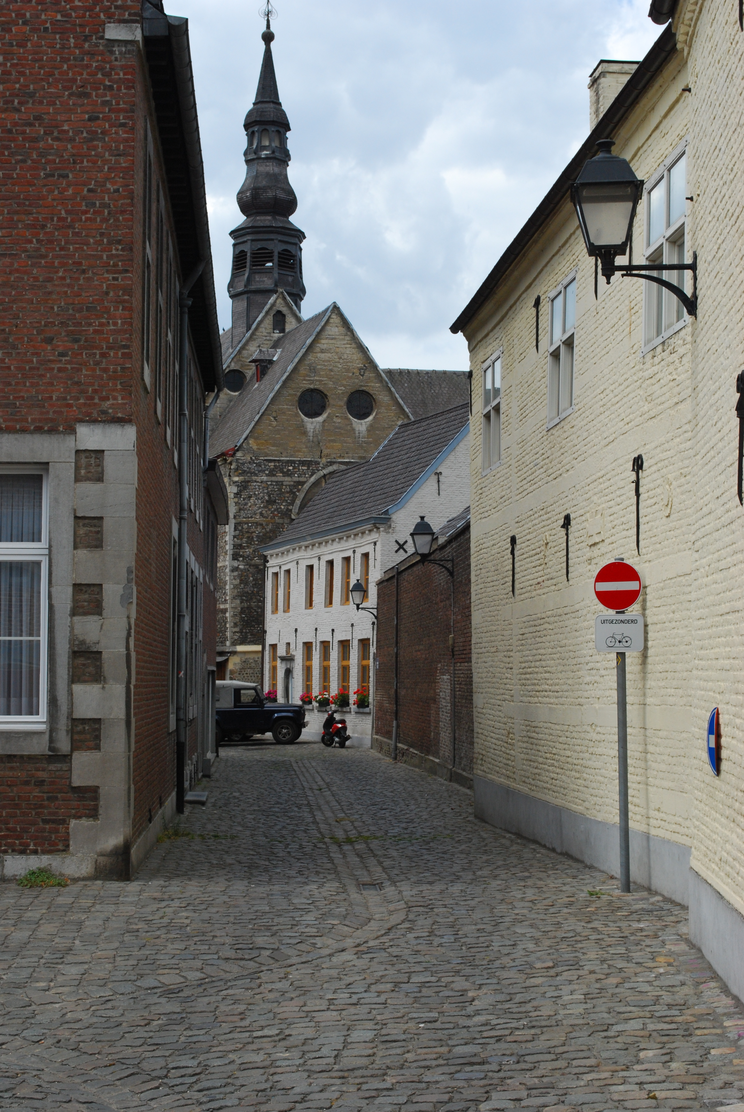 Le béguinage de Tongres : Sint-Rosastraat.